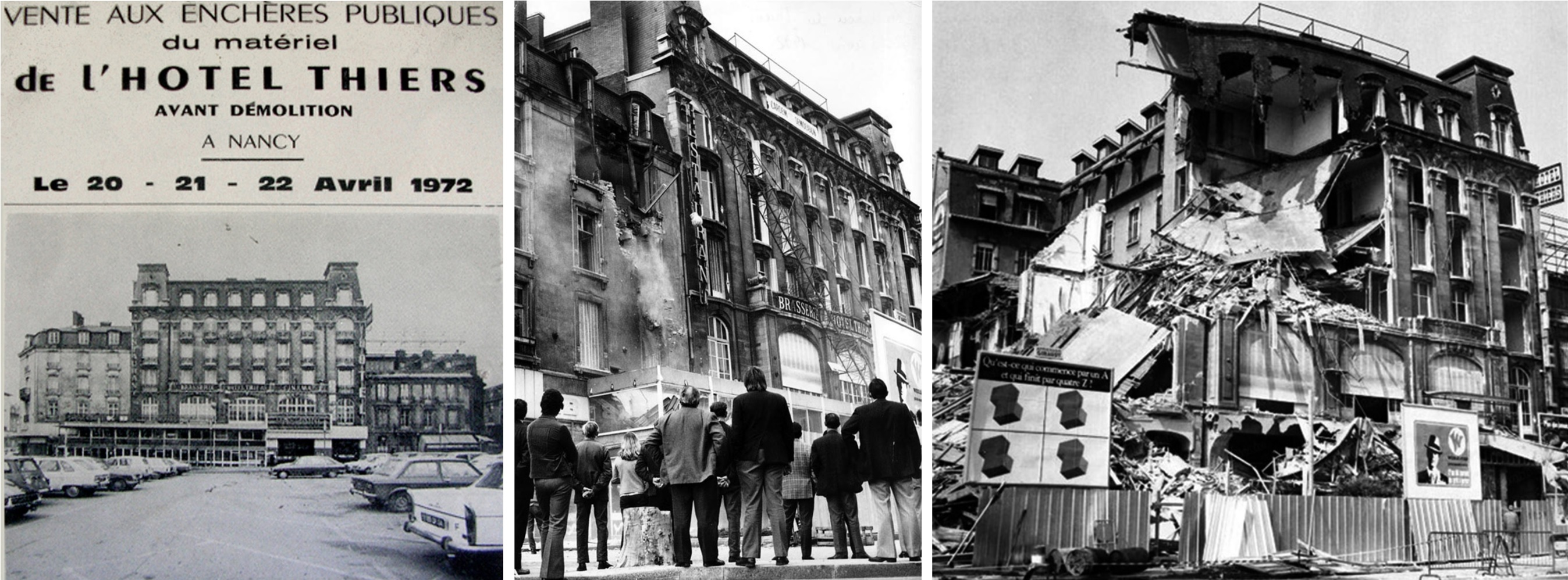 Démolition de l'Hotel Thiers de Nancy en 1973.